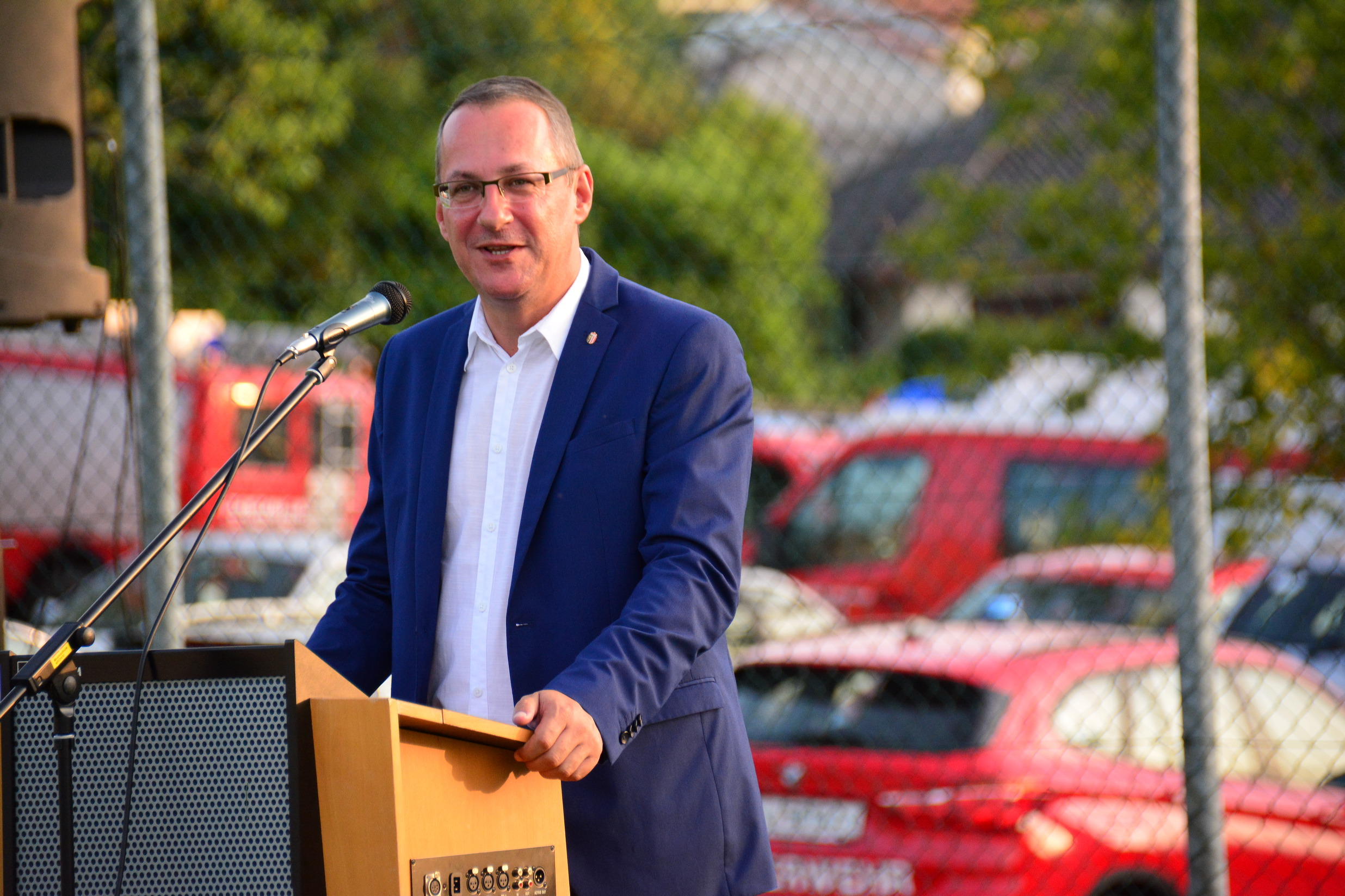 Alexander Nerat bei einer Feuerwehrveranstaltung in Gramastetten